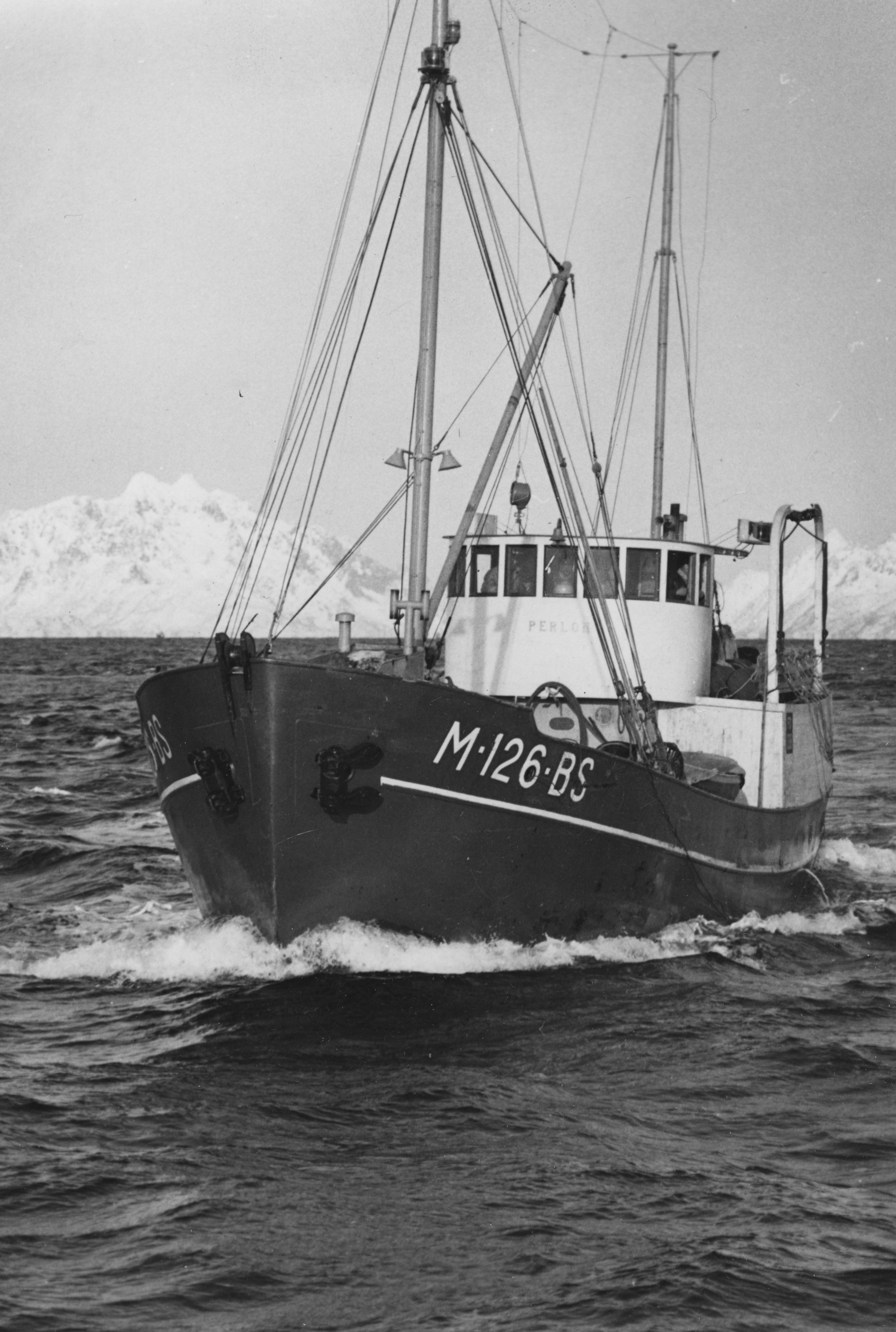 Bildet er hentet fra Nordlandsmuseet bildesamling etter Kanstad. Motivbeskrivelse: Farkosten M 126 BS (Bremsnes) Mkr "Perlon" Nøkkelord: Båter og fartøyer Motorbåter Egennavn på dyr og ting